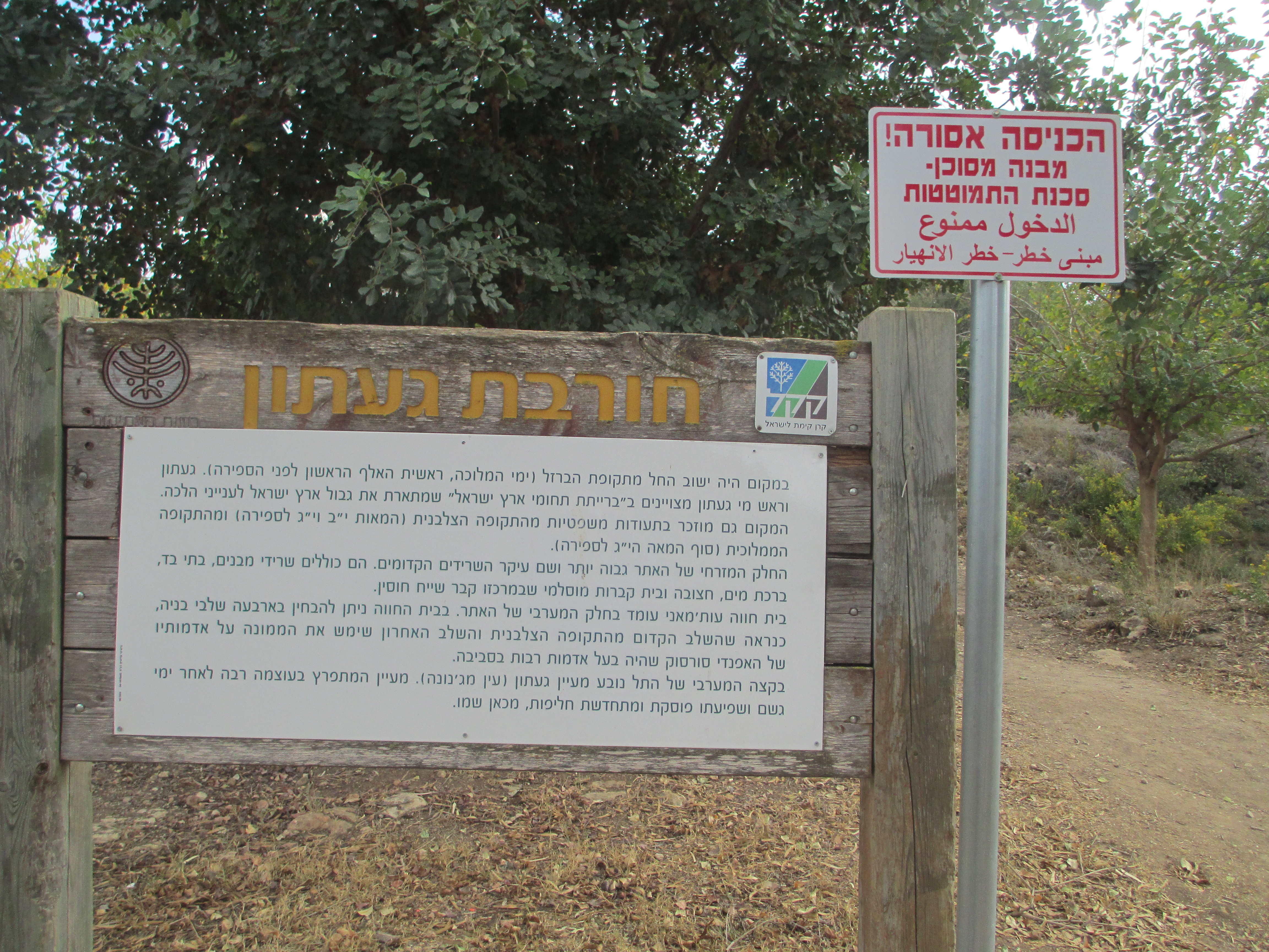 שלט בחורבת געתון